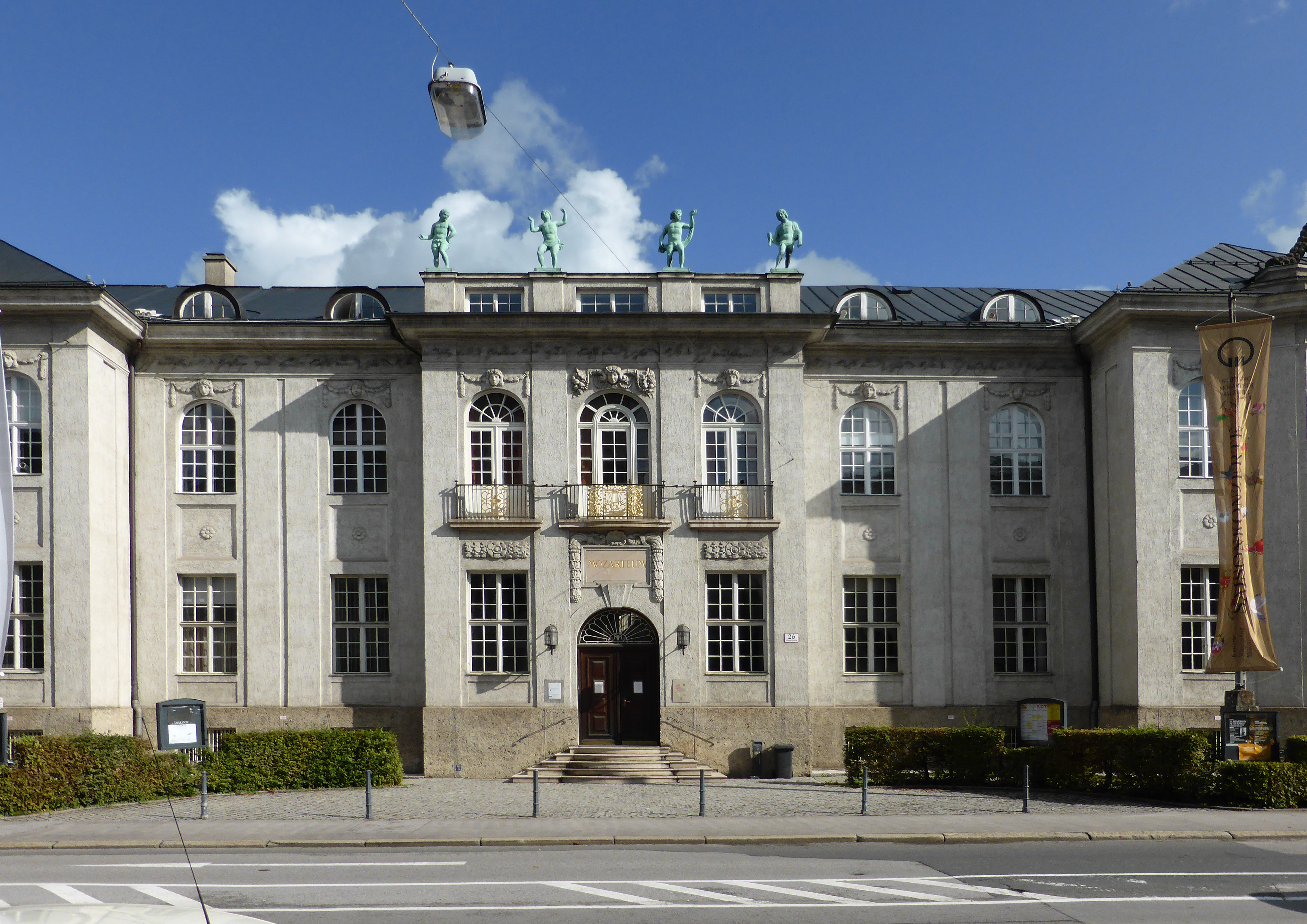 Internationale Stiftung Mozarteum Schwarzstraße 26, Salzburg.